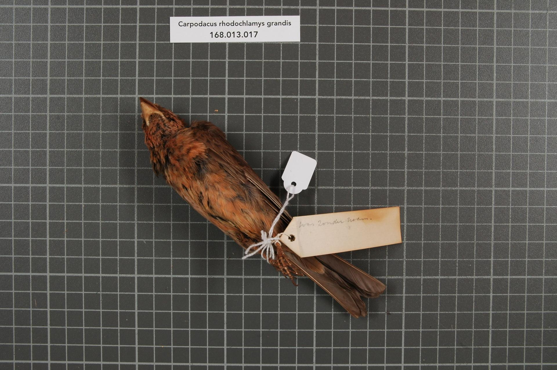 Carpodacus rhodochlamys grandis Blyth, 1849